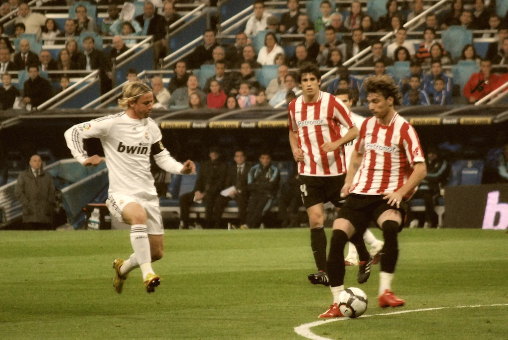 Guti